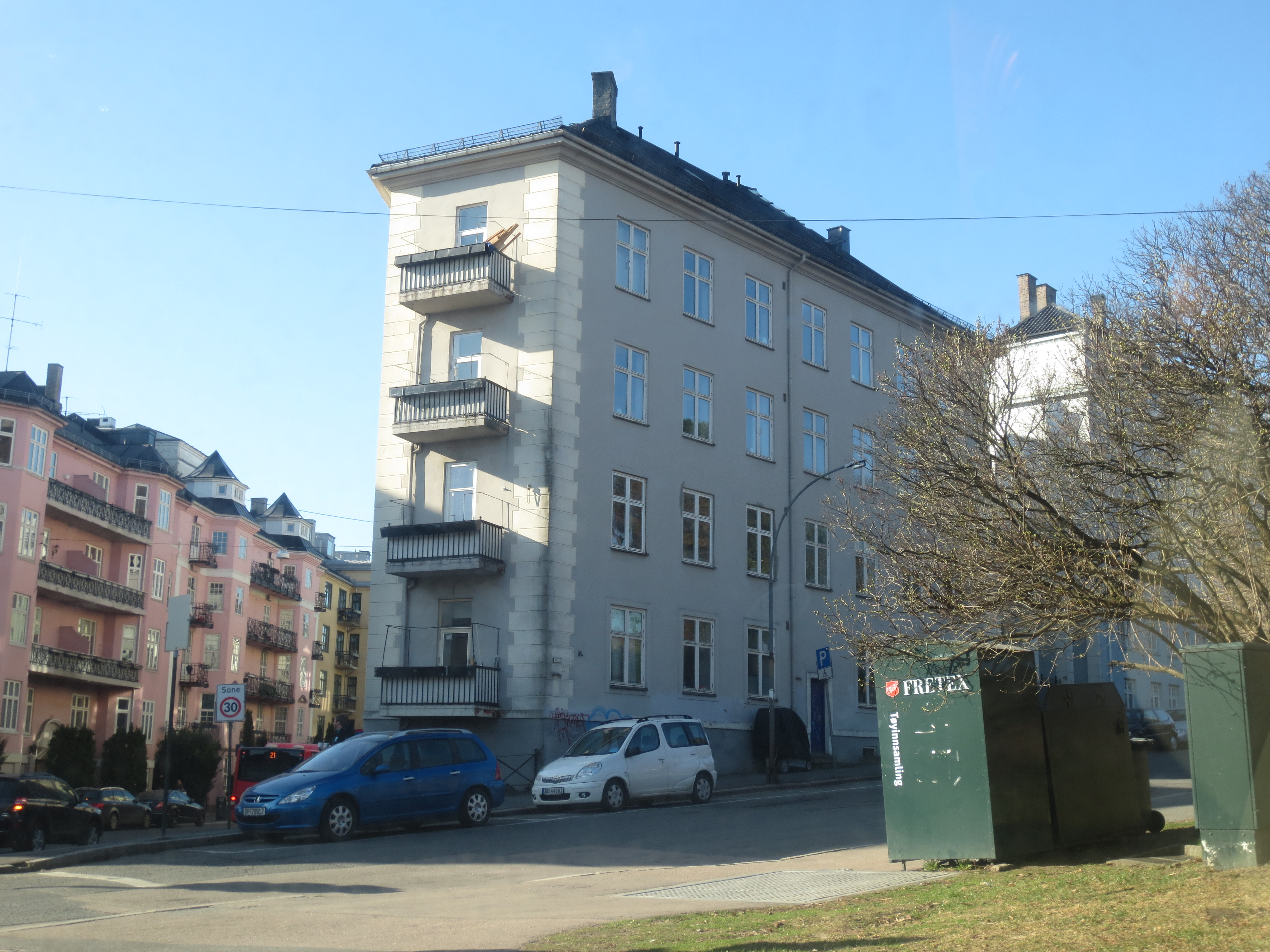 Camilla Colletts vei 20, på Uranienborg, Oslo. Dette er den eneste bygården i området som ikke selv har bygningsvern, men hele området er klassifisert som "nasjonal verneinteresse" av Riksantikvaren.